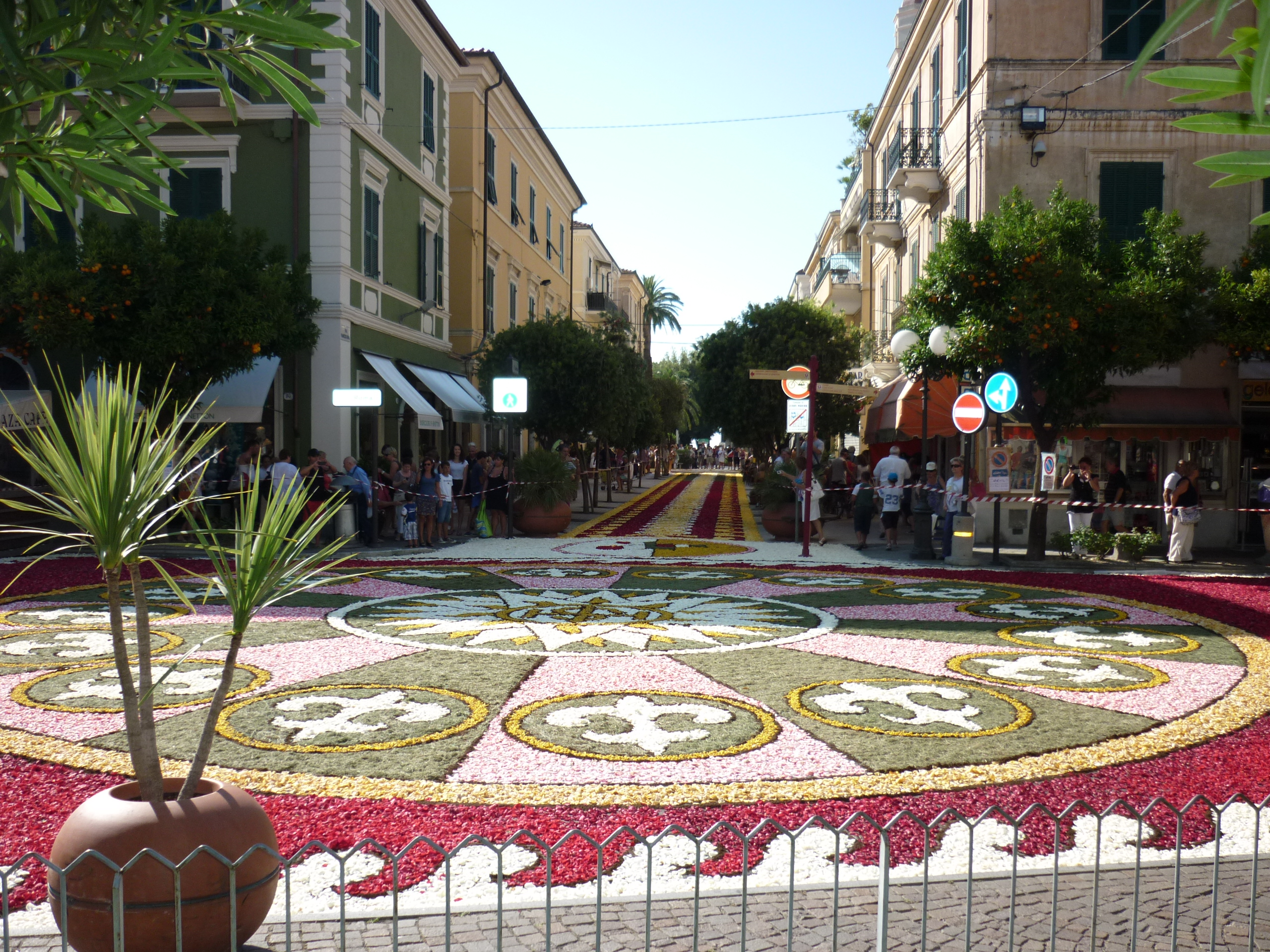 festa del corpus domini Diano Marina